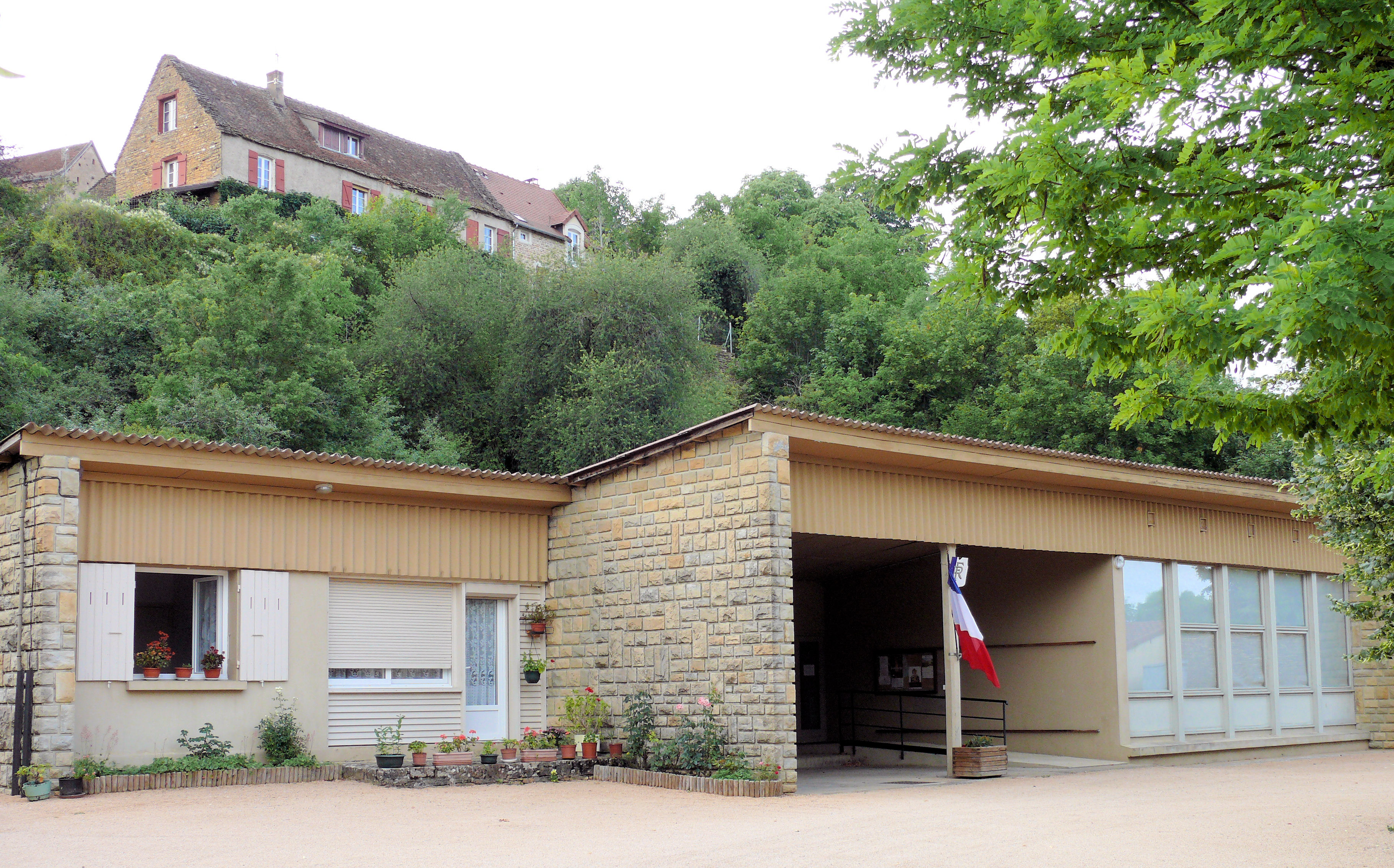 Taizé (Saône-et-Loire) - Mairie